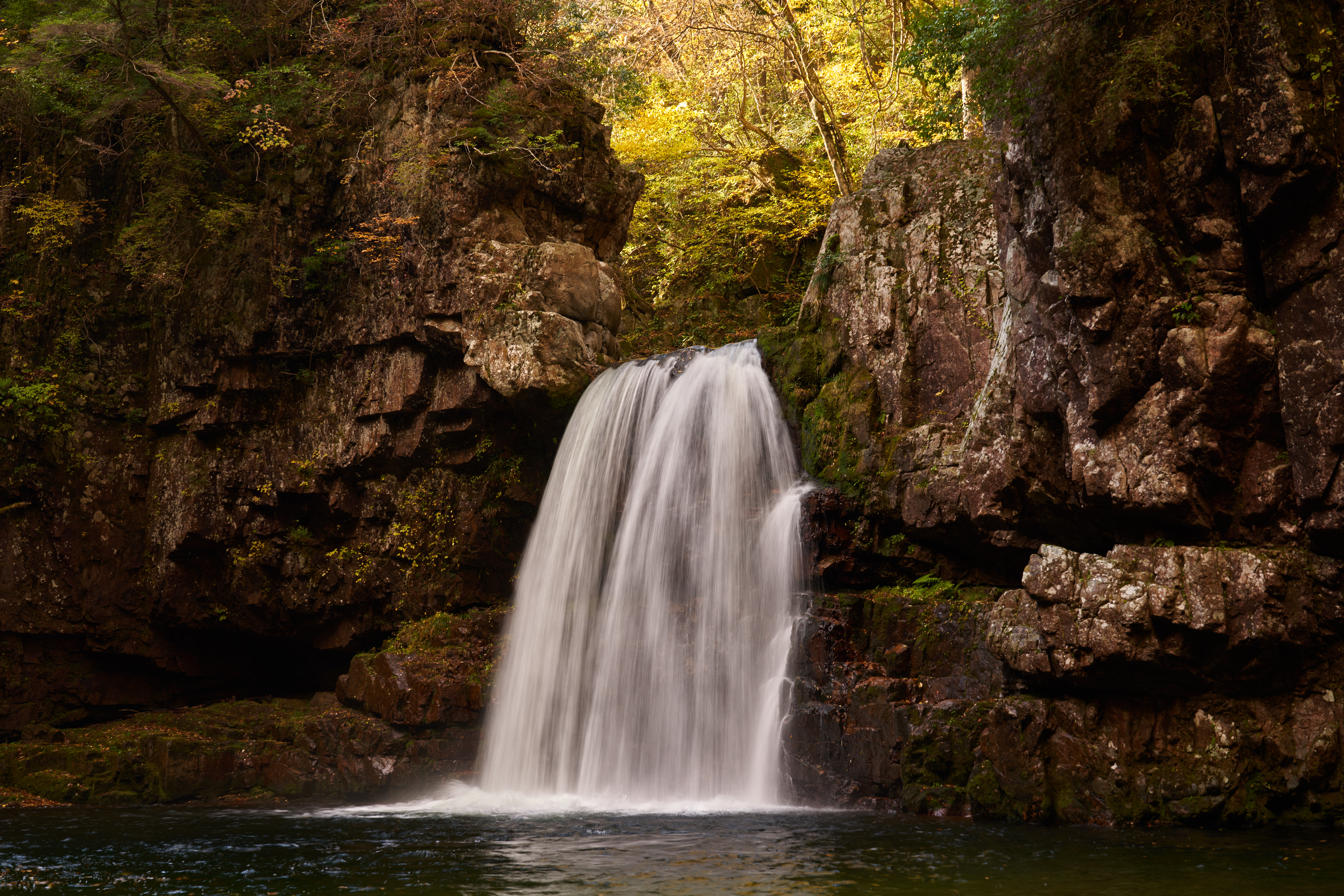 二段滝は現在も後退を続けているものの、樽床ダムの完成以降は水量がやや減ったと言われている